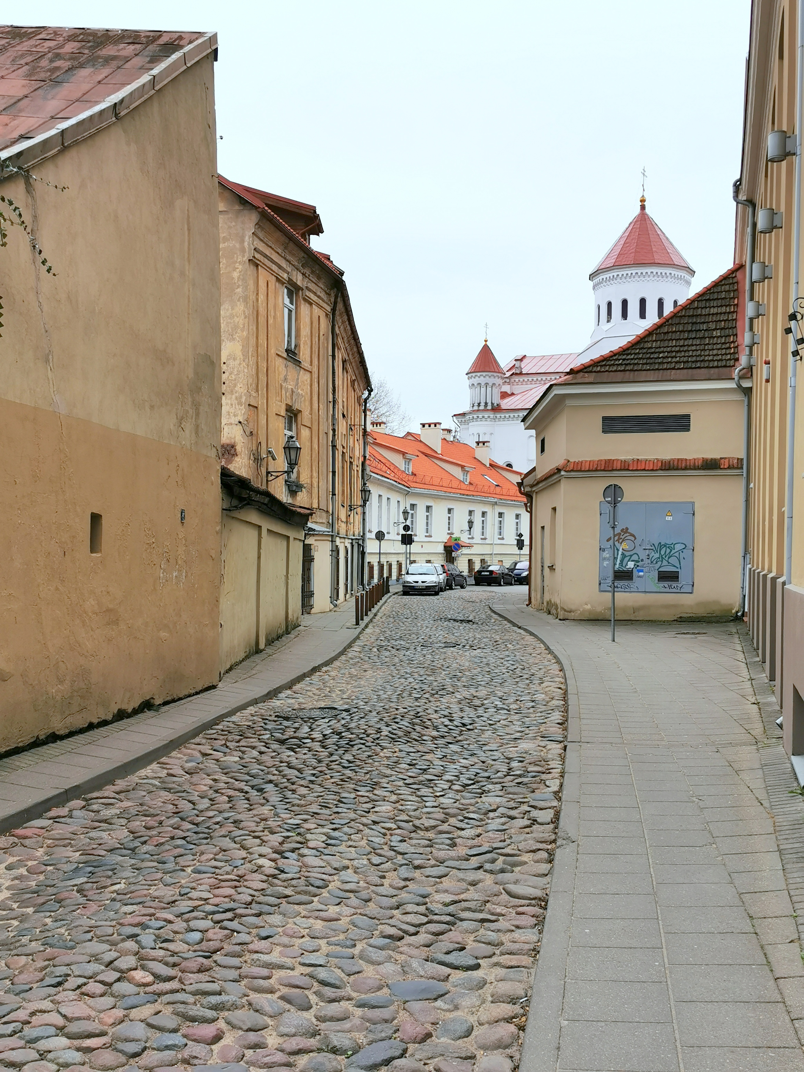 Rusų gatvė